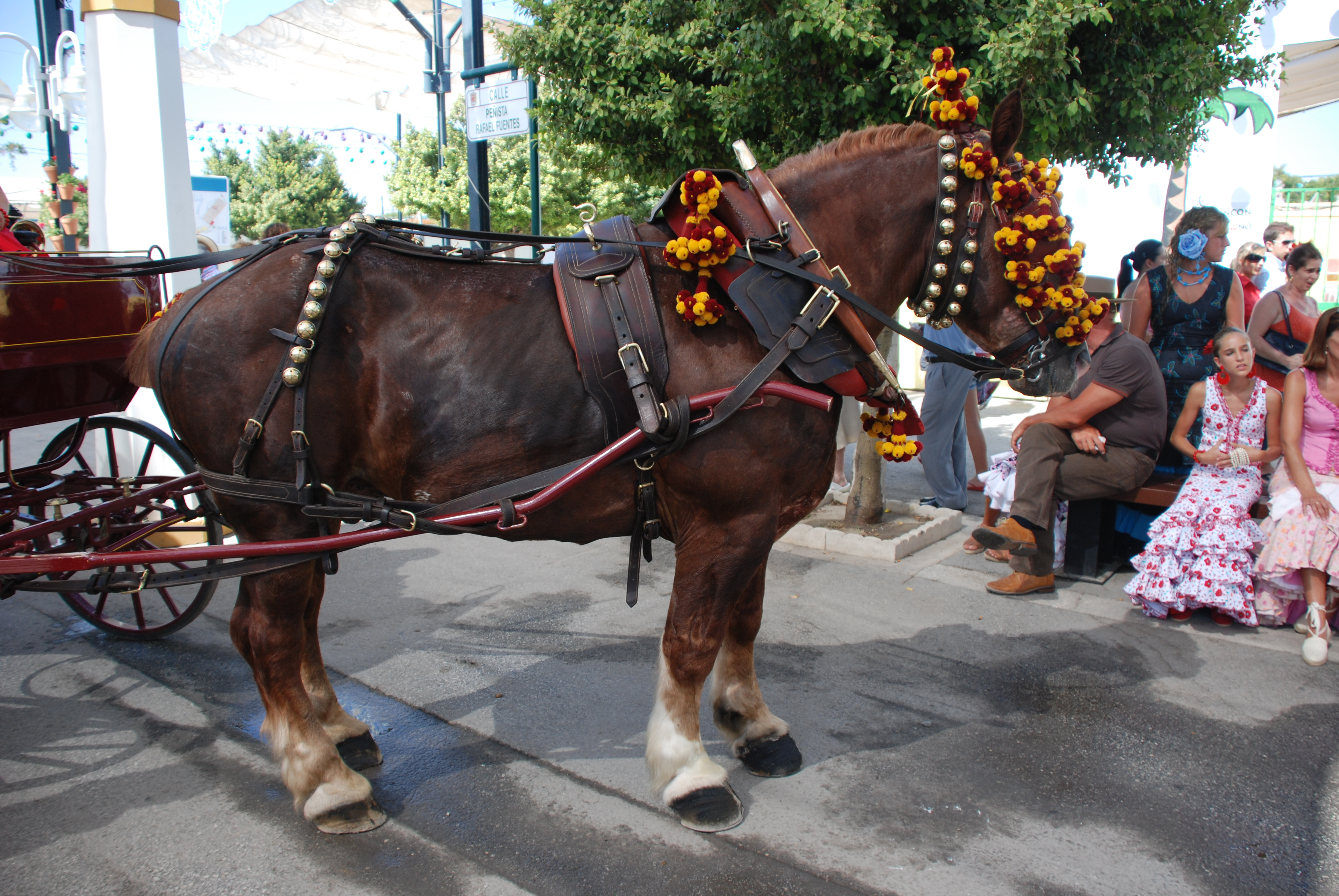 Percherón